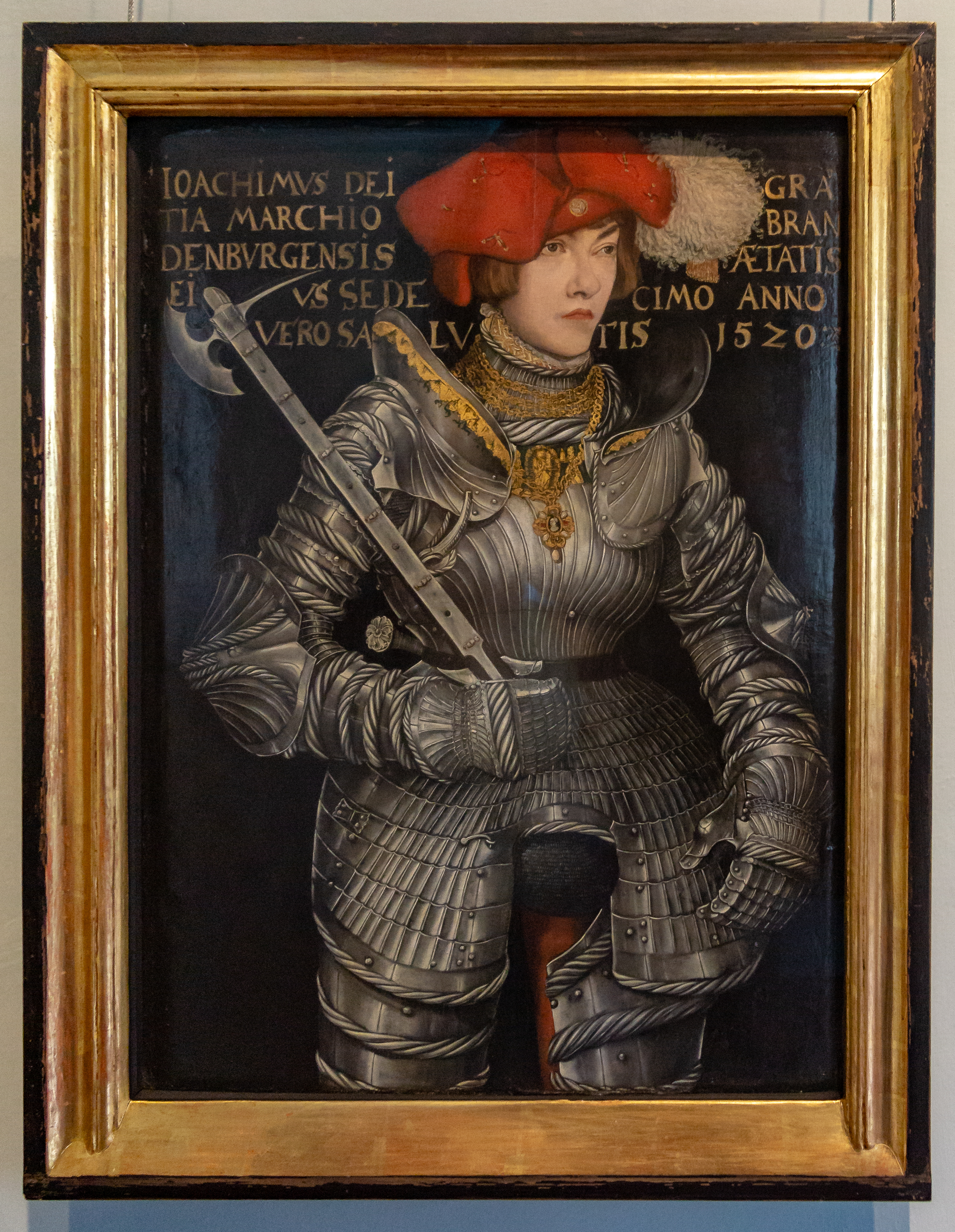 Joachim II. von Brandenburg